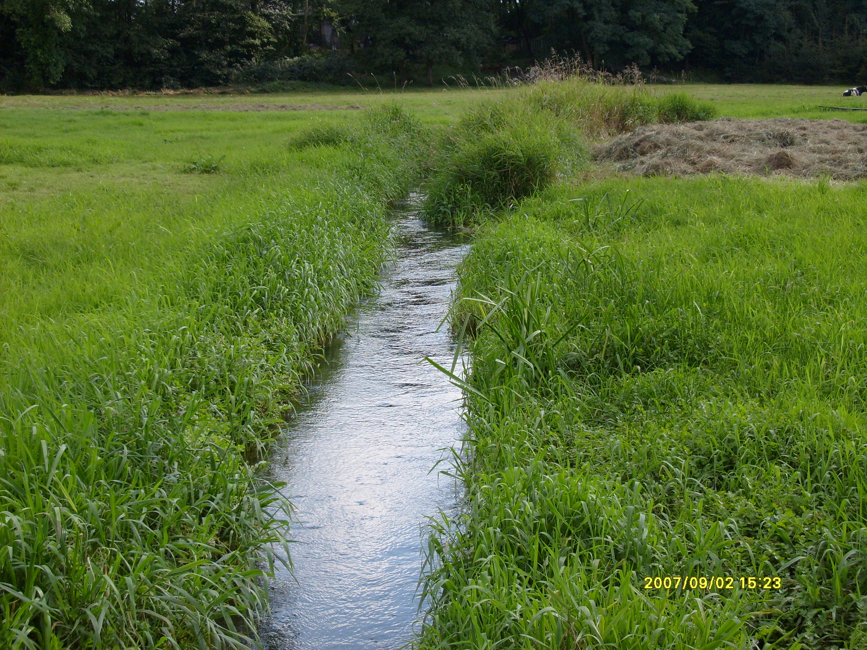 Rębielice Królewskie - rzeka Kamionka